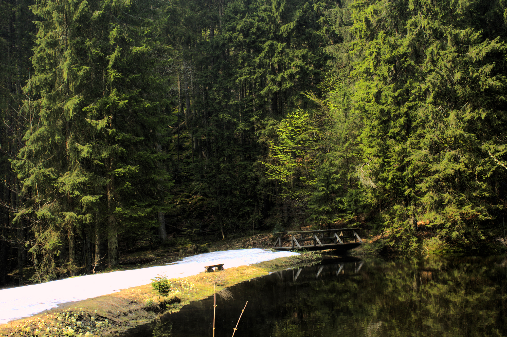 Brücke zum Höllbachgspreng